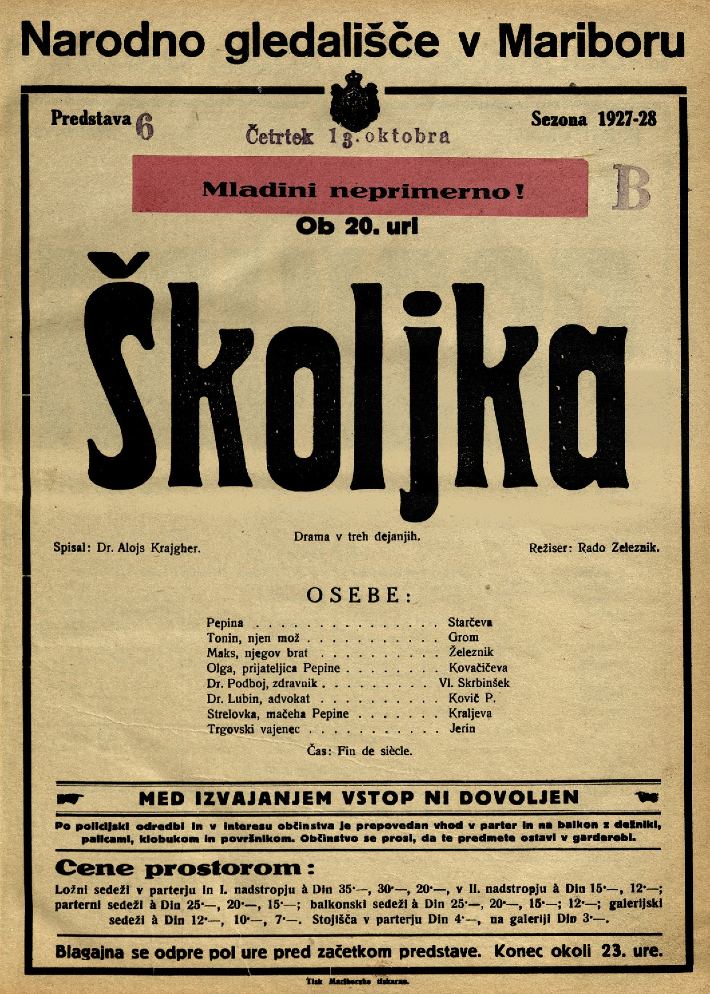 Plakat za predstavo Školjka v Narodnem gledališču v Mariboru.